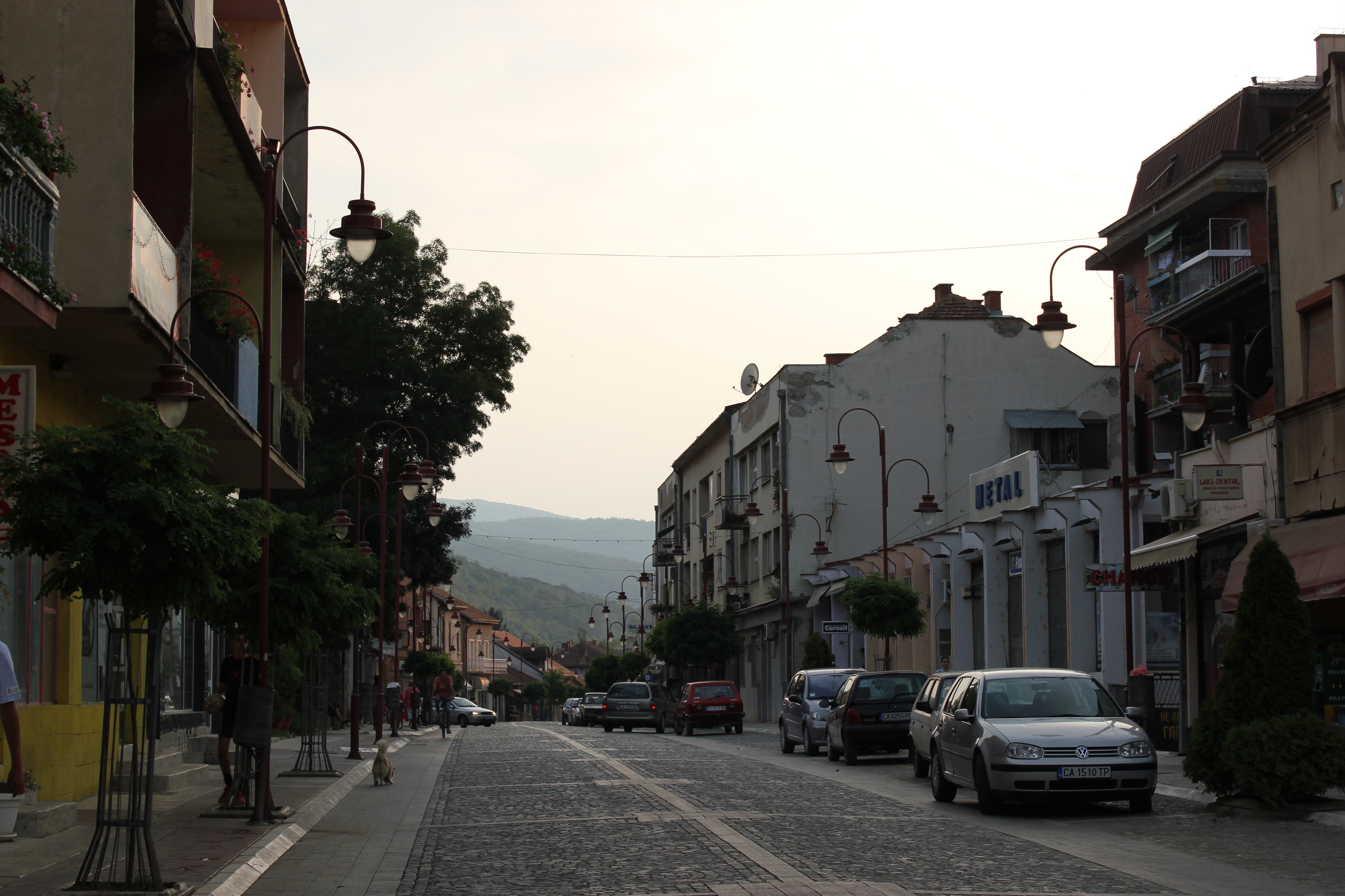 Hornjoserbsce: W srjedźišću Dimitrovgrada, Serbiska.